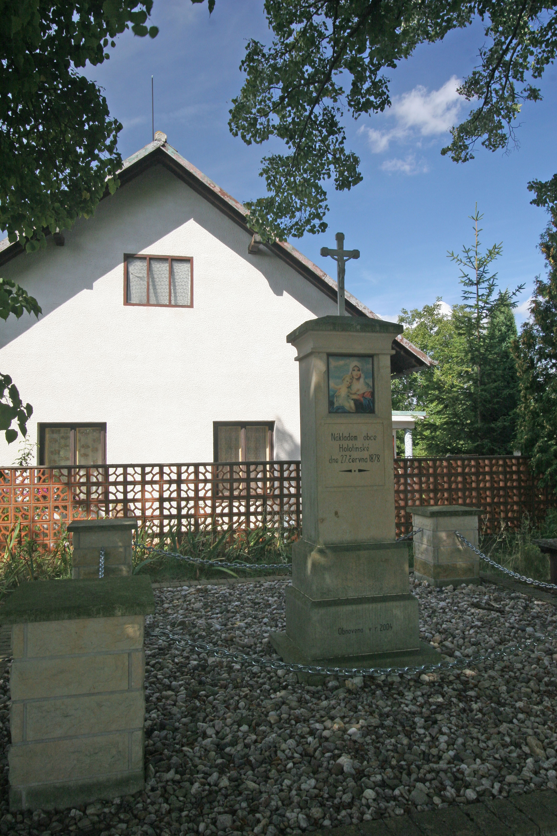 Holotín křížek